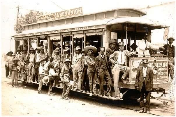 transportegomezpalacio